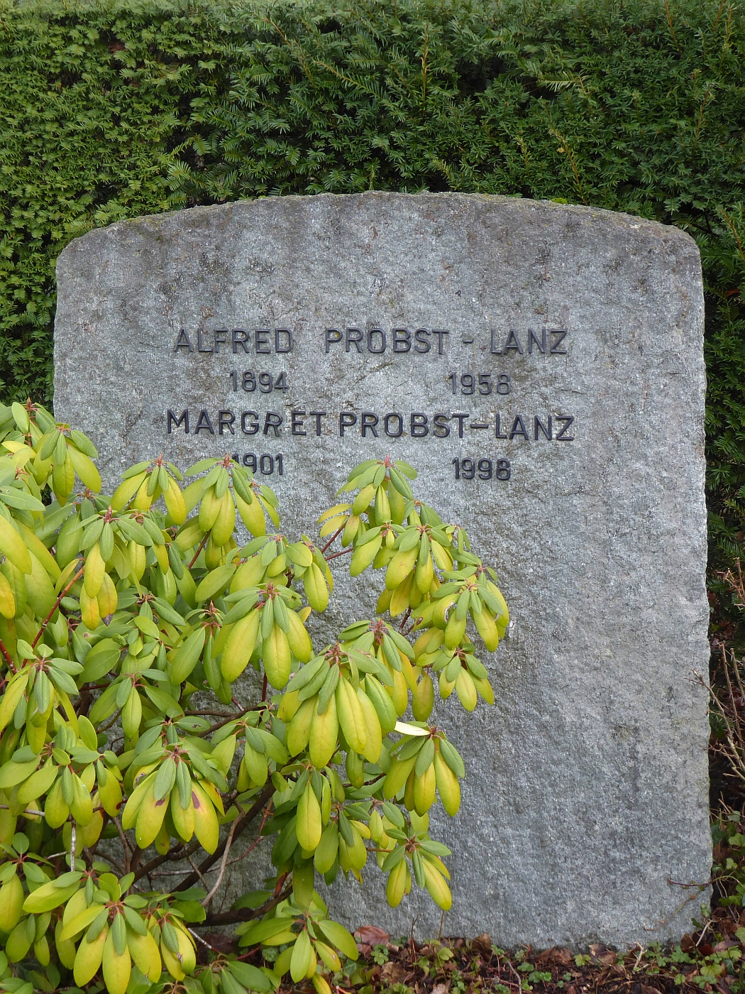 Alfred Probst-Lanz (1894–1958), Ruderer, 1924 Gewinner von zwei Olympia Medaillen. Grab auf dem Friedhof Hörnli, Riehen, Basel-Stadt